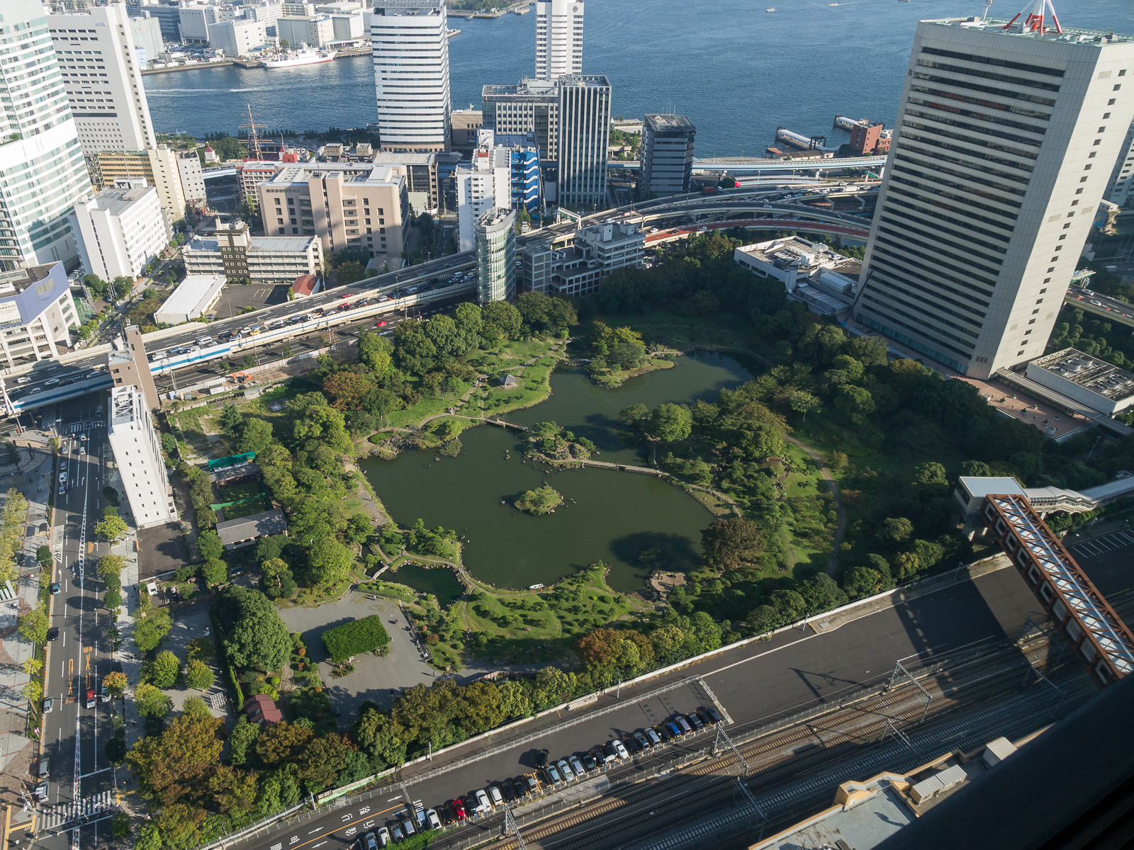 旧芝離宮恩賜公園、東京都港区海岸。